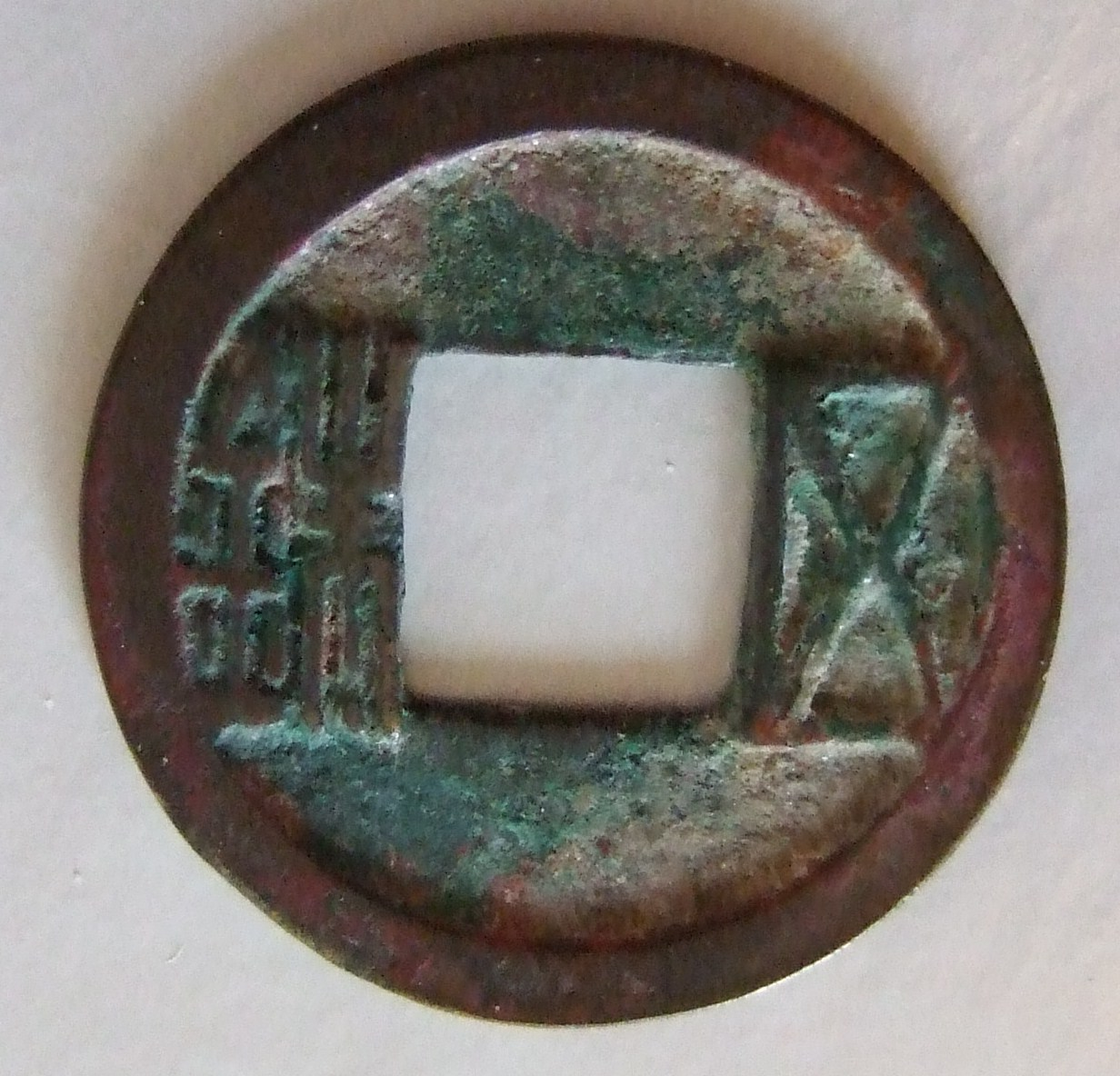 CHINA, SUI DYNASTY, EMPEROR WEN, 589-618 ---5 SHU CASH a